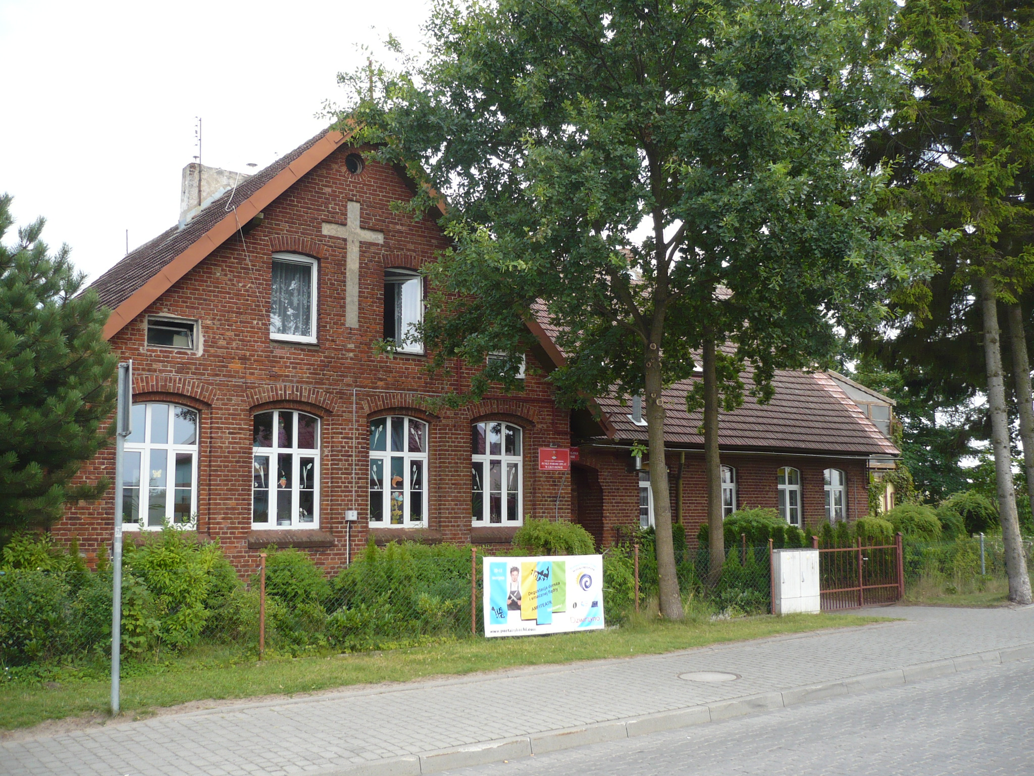 Grzybowo, dawna szkoła